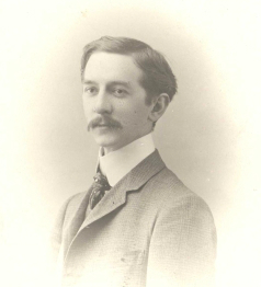 Immagine tratta dall'archivio G. Papini conservato presso la Fondazione Primo Conti di Fiesole. Foto di J. Luchaire - 1906. Timbro del fotografo Cav. A. Cattani & Figli - Firenze